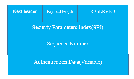 Монгол: captiretfghjkl